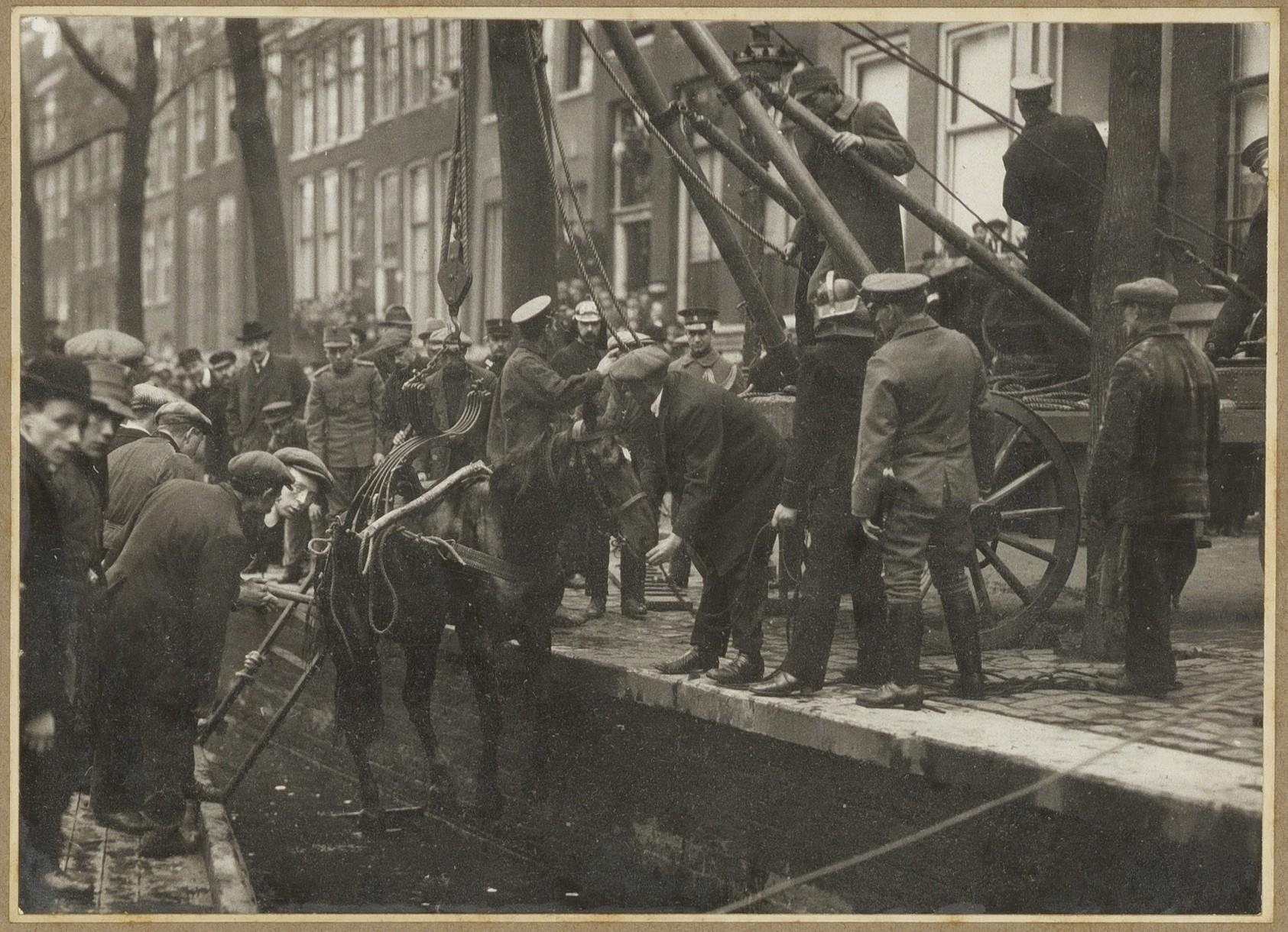 Beschrijving Het takelen van een paard van de Stadsreiniging uit een gracht Documenttype foto Vervaardiger Onbekend Anoniem Collectie Collectie Stadsarchief Amsterdam: foto-afdrukken Datering 18 april 1919 Inventarissen Afbeeldingsbestand ANWR00191000001